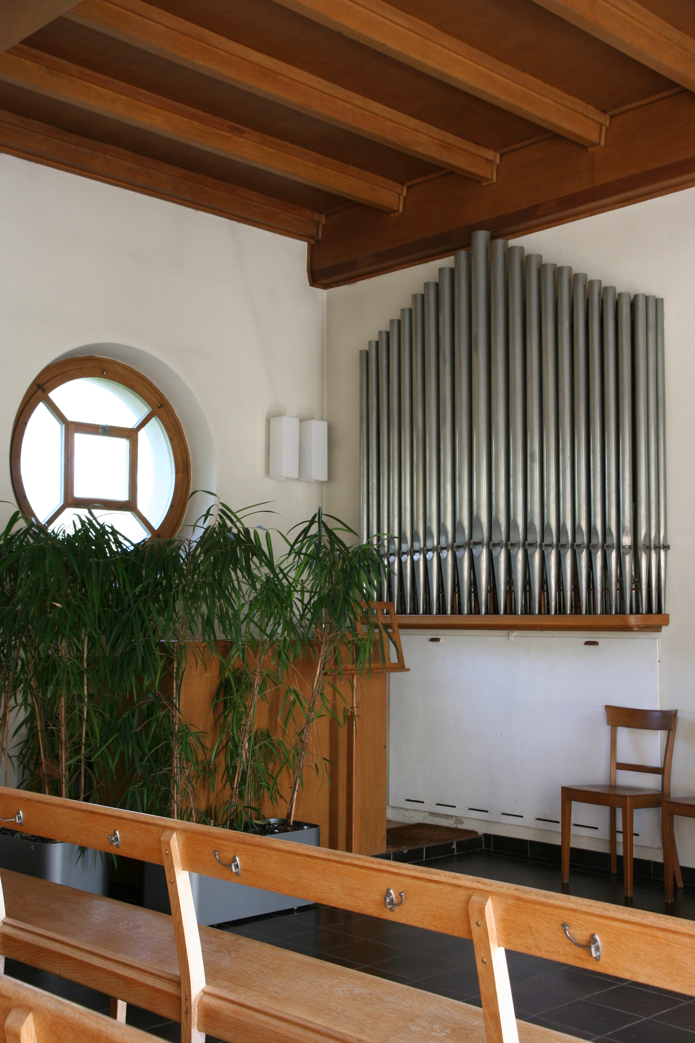 Friedhof Nordheim Kapelle